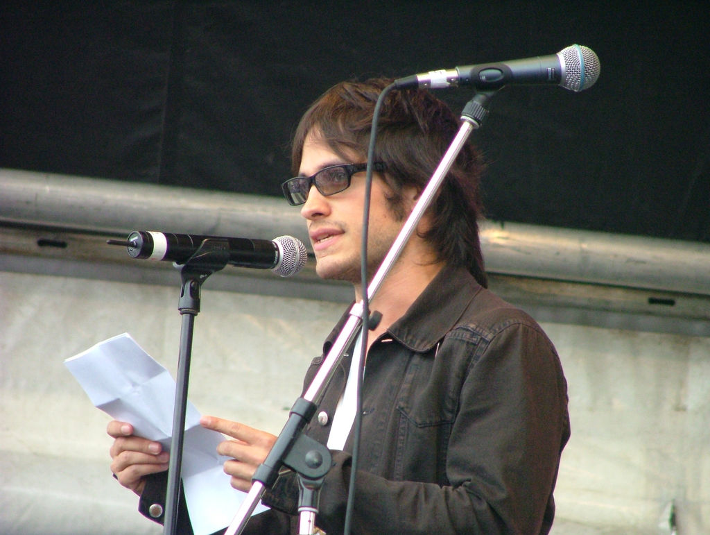 Photo de Gael García Bernal prise par l'utilisateur Sophs74 sur Flickr